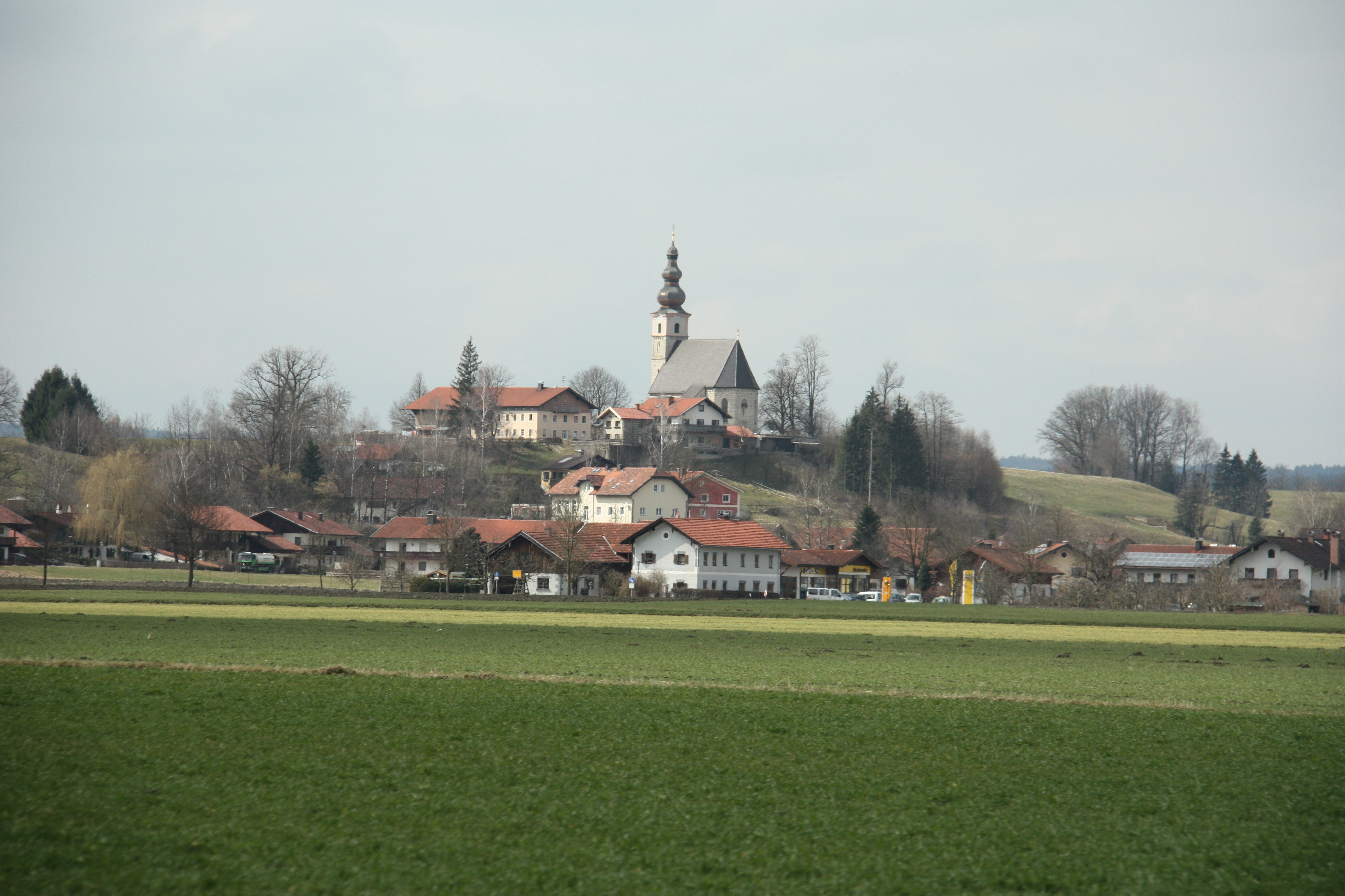 Der Fridolfinger Stadtteil Pietling, von der Bundesstraße 20 aus gesehen.